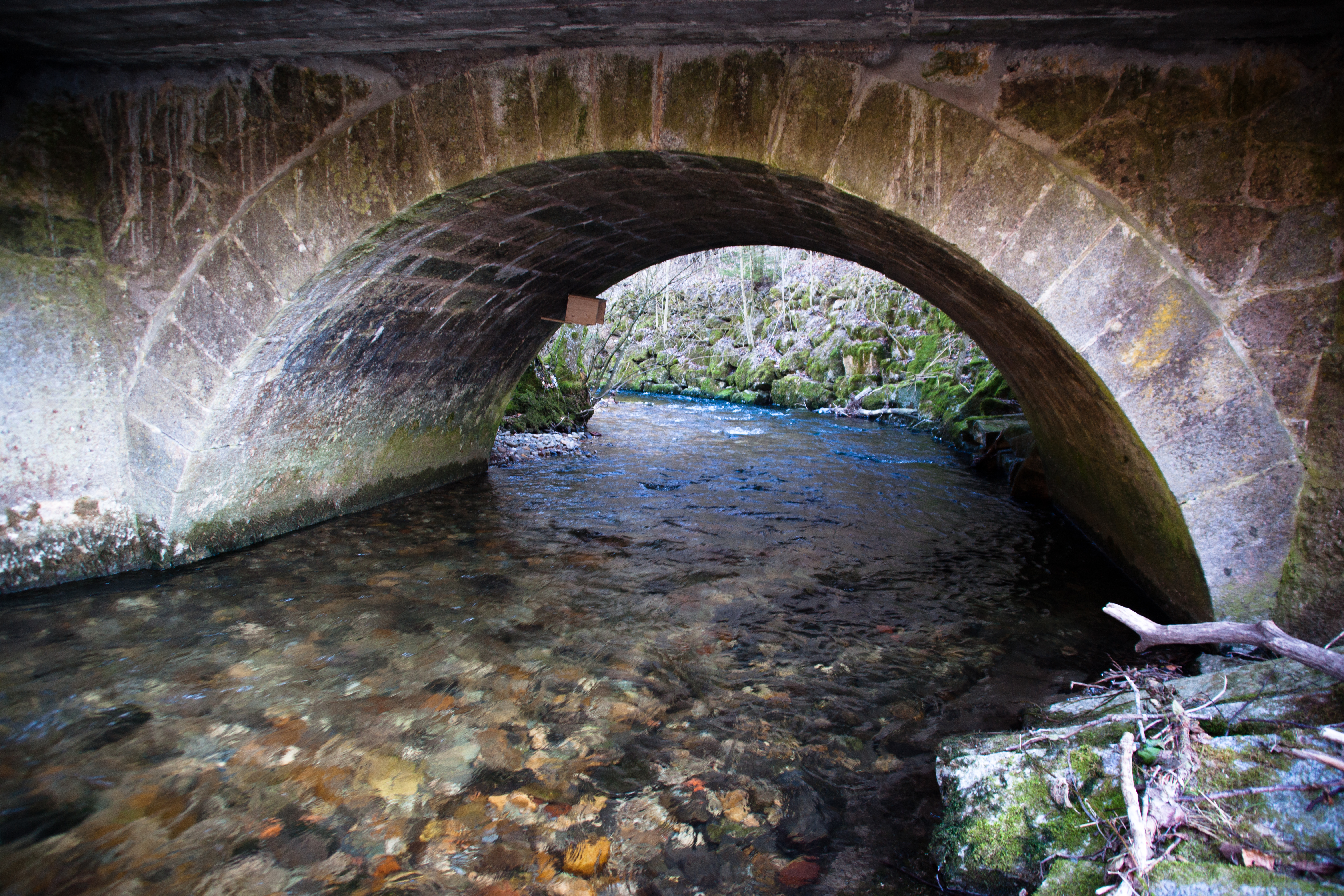 Pont sur la Venoge entre Chevilly et Moiry.